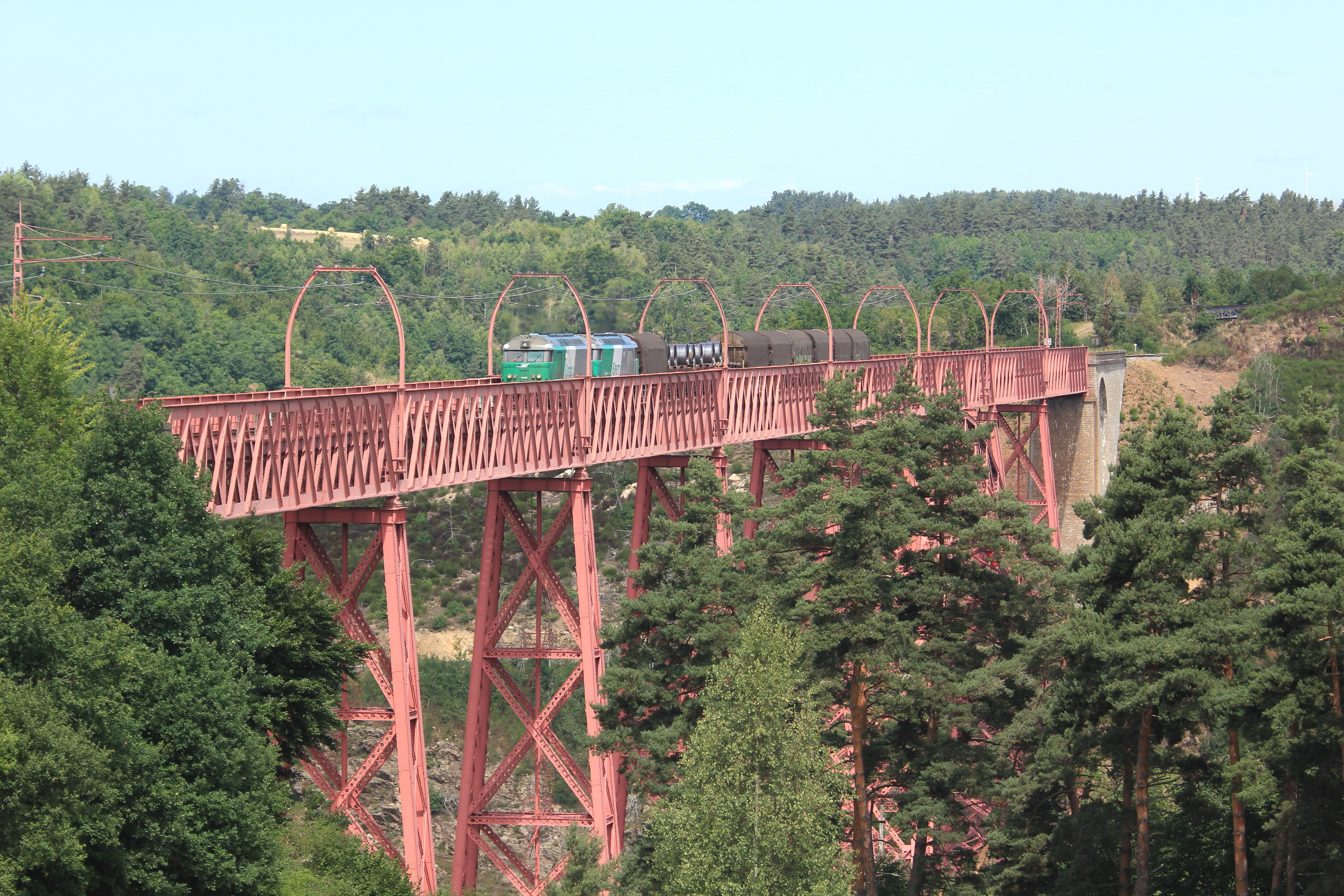 Train de fret pour l'usine Arcelor Mittal de Saint-Chély-d'Apcher franchissant le viaduc de Garabit.